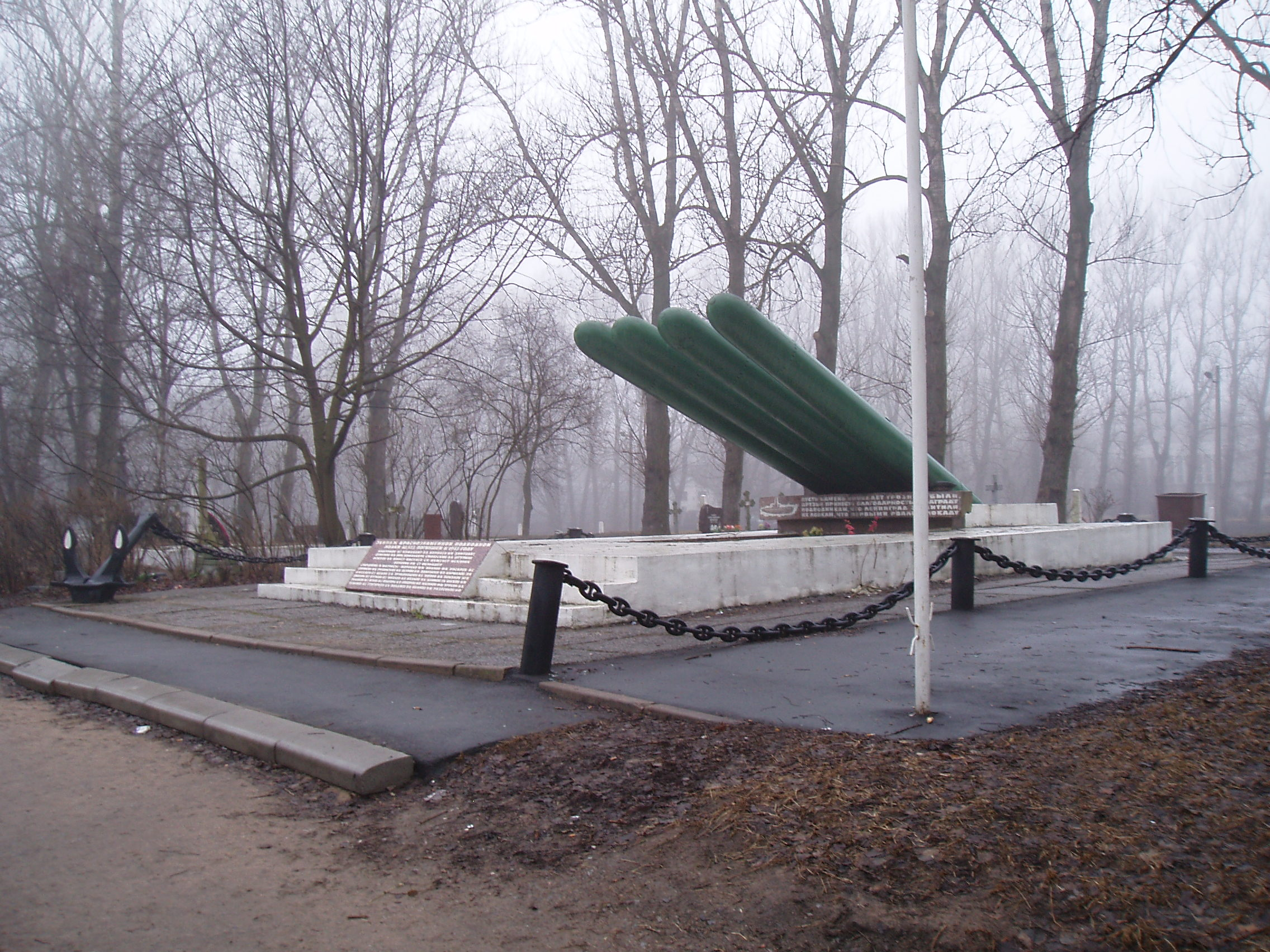 Мемориал погибшим подводникам Щ-323 на кладбище «Остров Декабристов» в Санкт-Петербурге